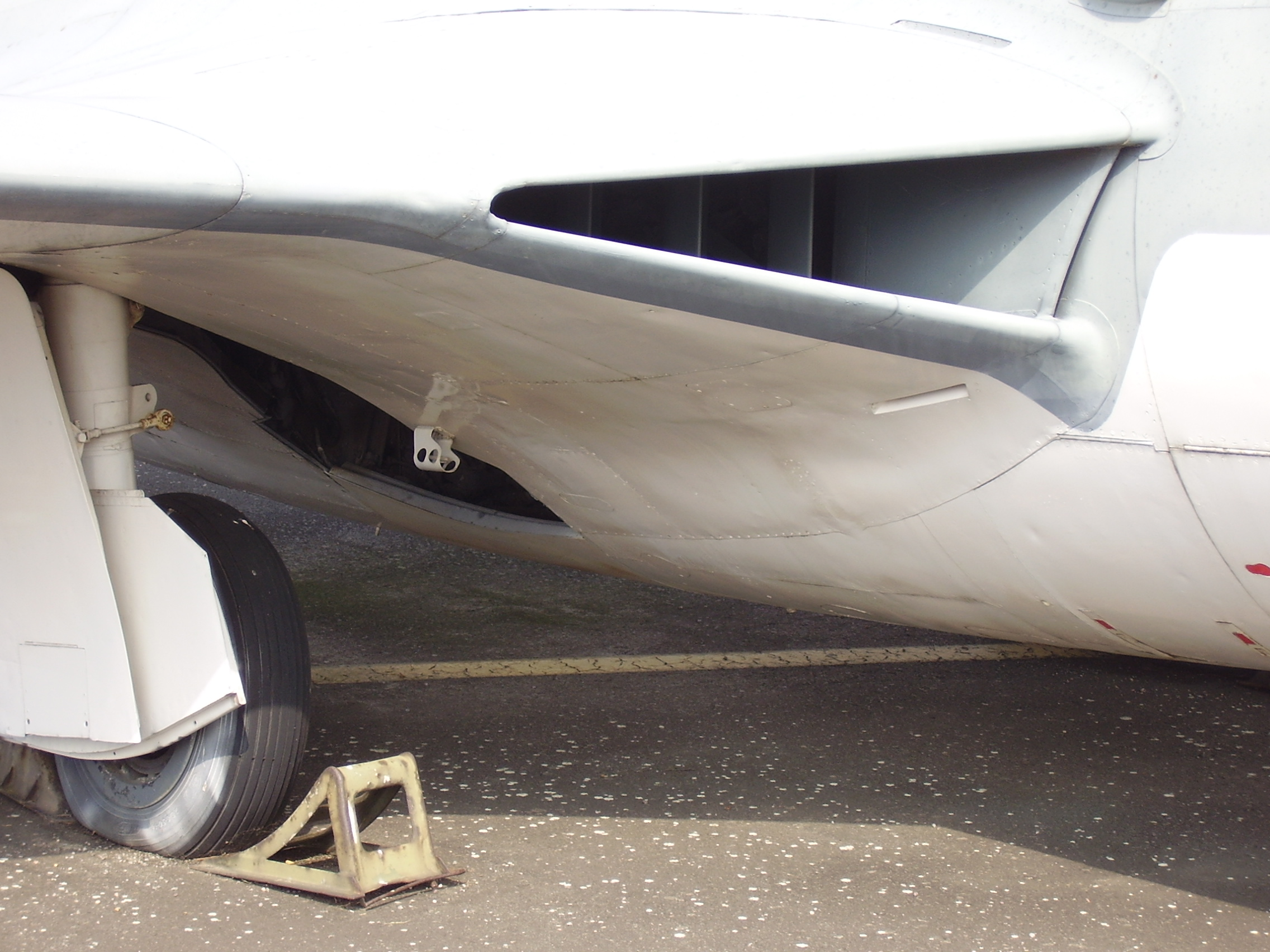 Luftwaffenmuseum der Bundeswehr; Airforce Museum of the Bundeswehr; Berlin-Gatow, Mk.4